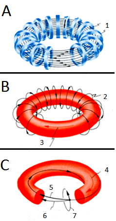 Magnetfelder ohne Text